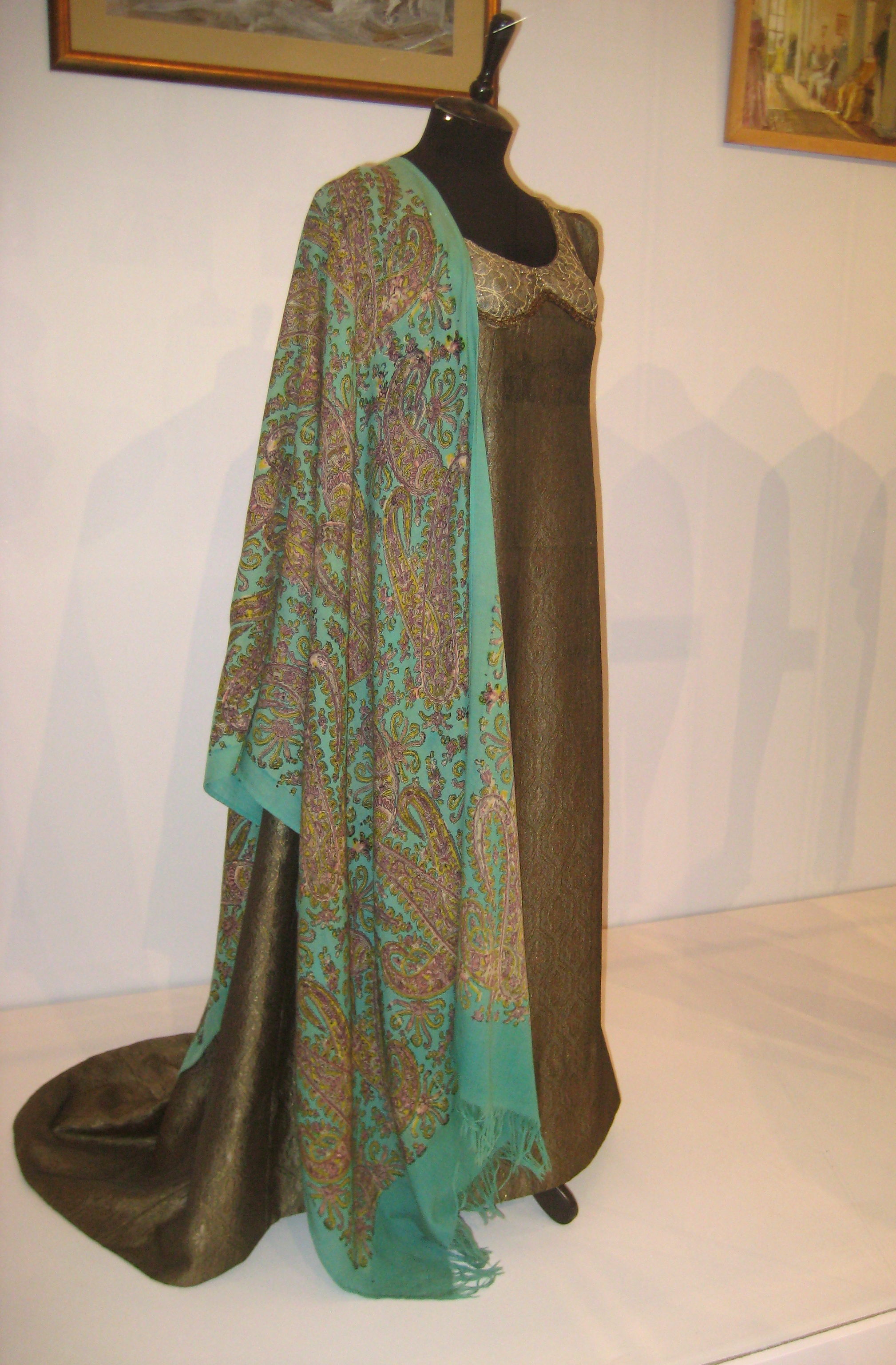 Костюмы из кинофильма "Война и мир" С. Бондарчука. Художник по костюмам Н.В. Бузина. 1965-67. Музей: Мосфильм. Выставка: Время незабвенное, Манеж, 2012